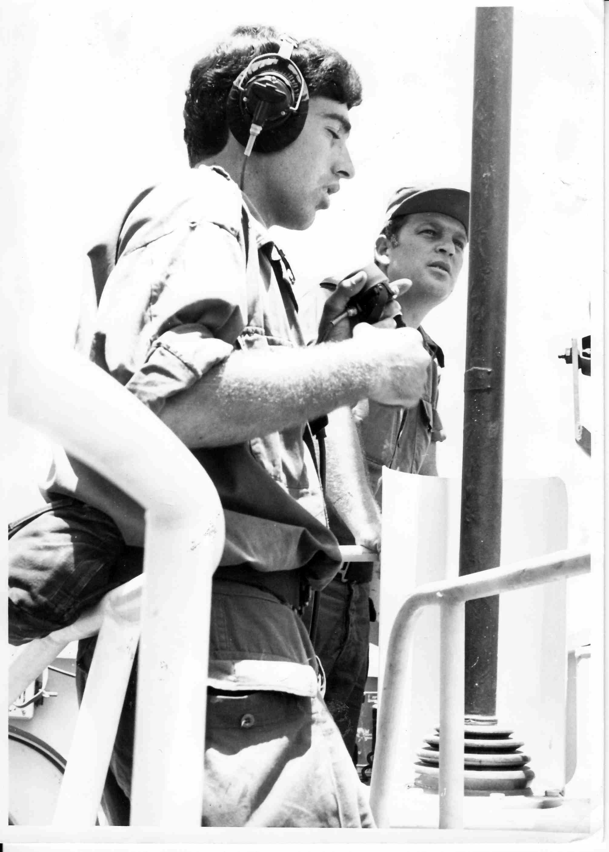 מיכה רם על גשר הפיקוד בעת תמרון אח"י רשף